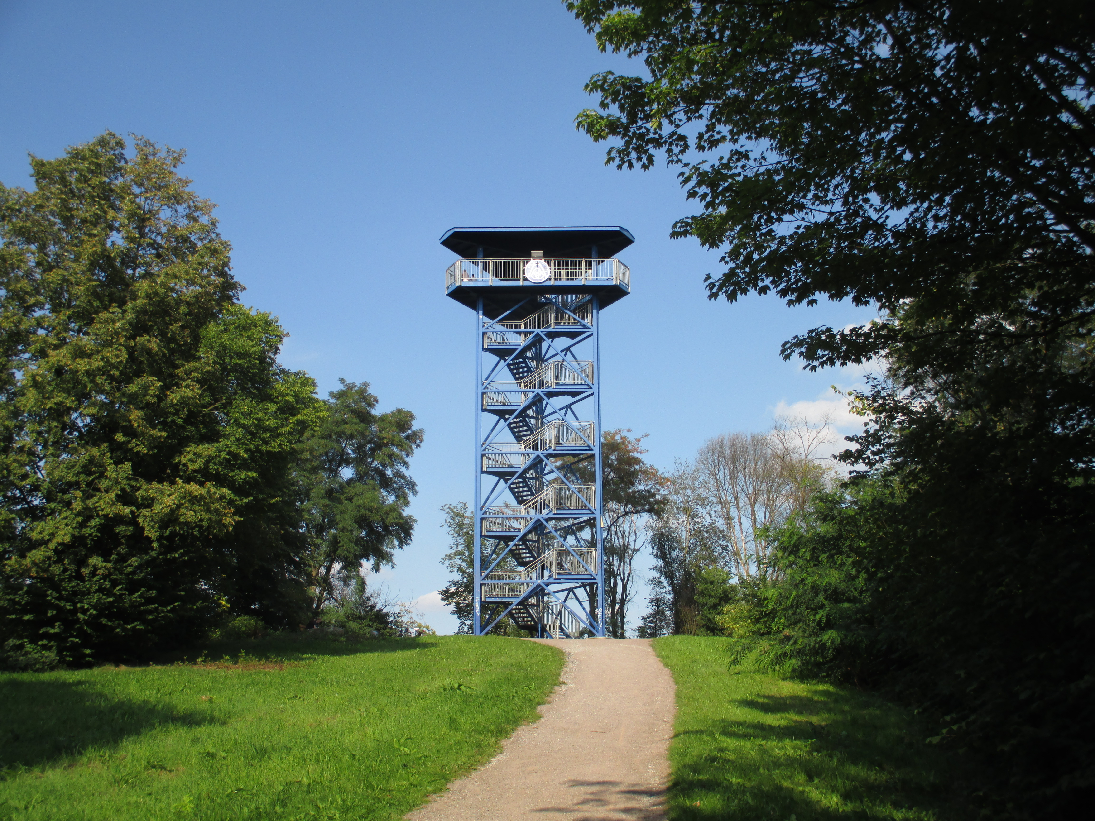 Wolfsberghalde mit Aussichtsturm am Wolfssee in Duisburg.